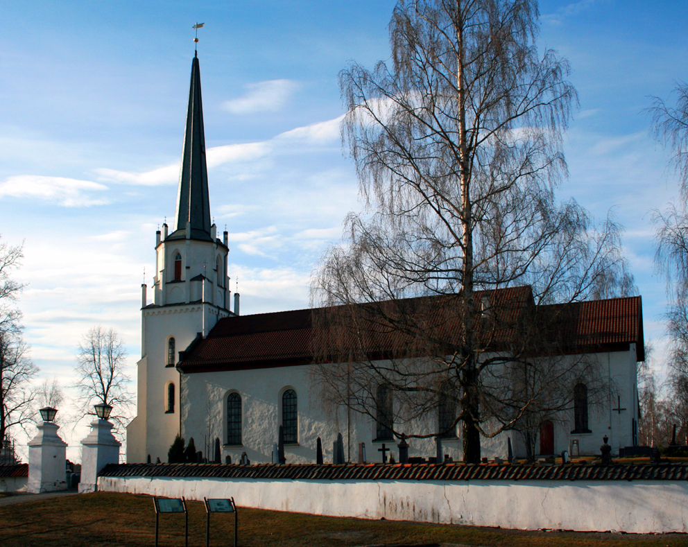 Løten kirke.